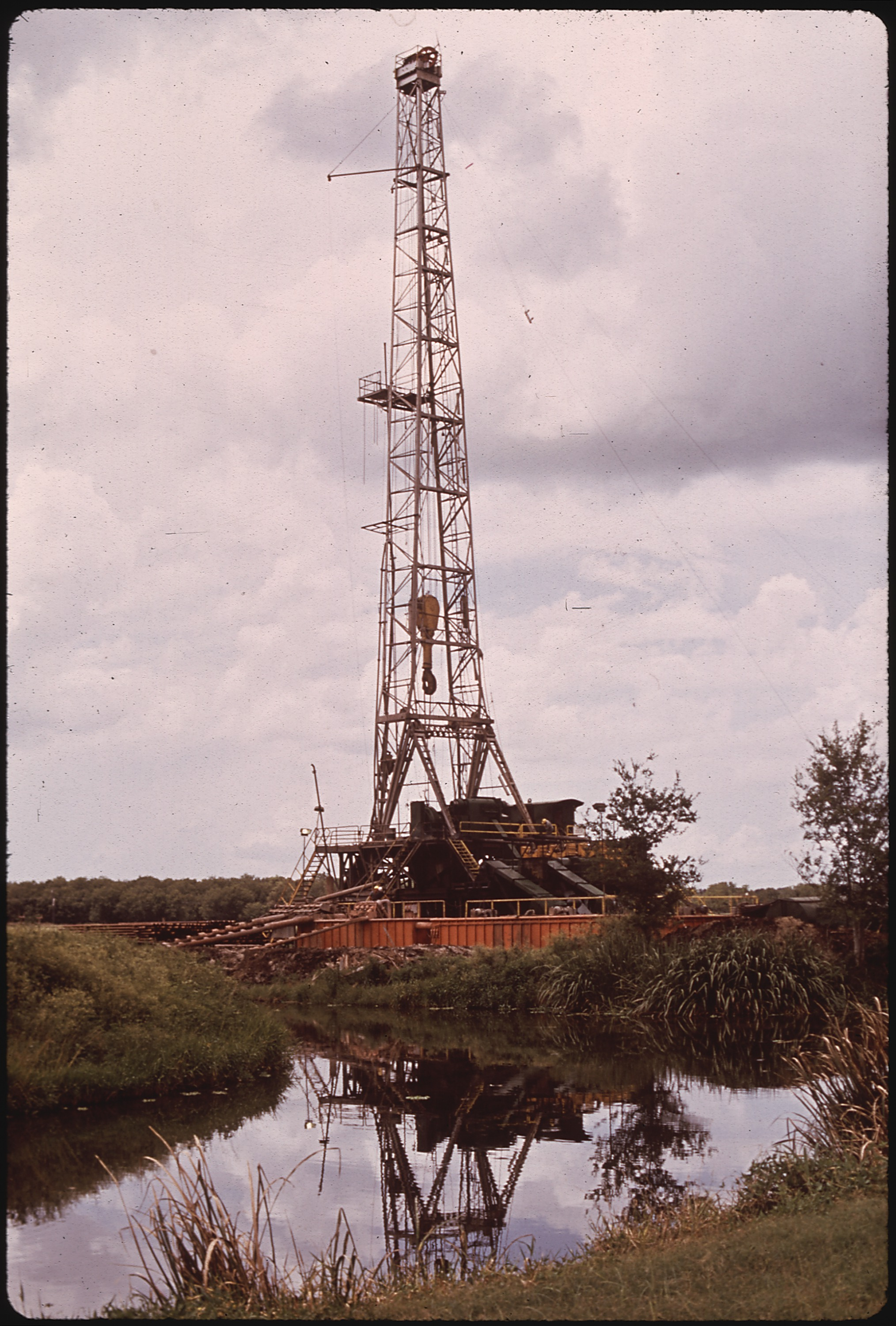 General notes: Louisiana